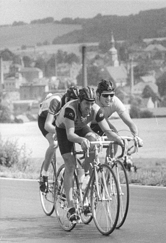 Hardy Gröger, Frank Kühn ADN-ZB Hiekel 13.8.88 Dresden: Sahsentour - Auf der 5. und vorletzten Etappe Dresden - Pirna über 193 km kam der Frankfurter ASK-Sportler Hardy Gröger (vorn) zum Etappensieg vor dem Spitzenreiter in der Gesamtwertung, Frank Kühn (Tsc Berlin,r.), und Gus-Erik Schur (SC DHfK Leipzig, dahinter). Die Spitzengruppe oberhalb von Pulsnitz.